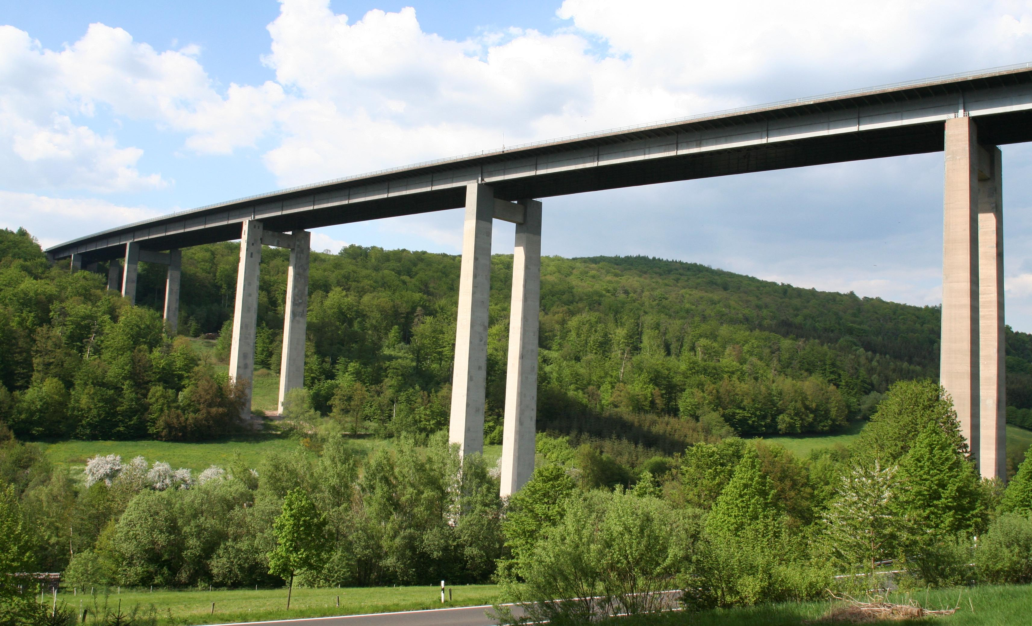 Grenzwaldbrücke der A7 bei Bad Brückenau in Unterfranken